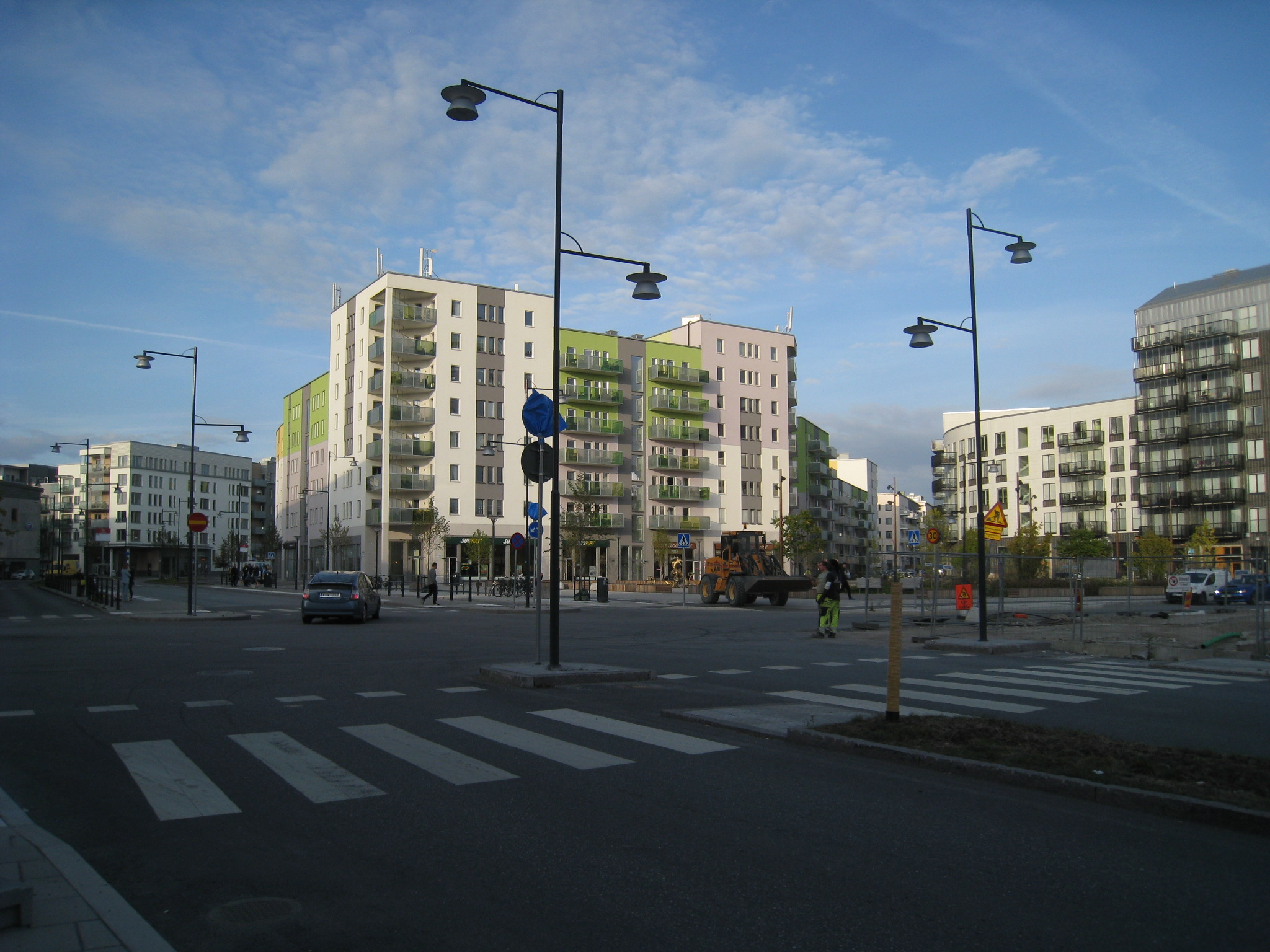 Barkarbystaden, Järfälla kommun, Stockholms län, Stora Torget under byggnation, september 2016.